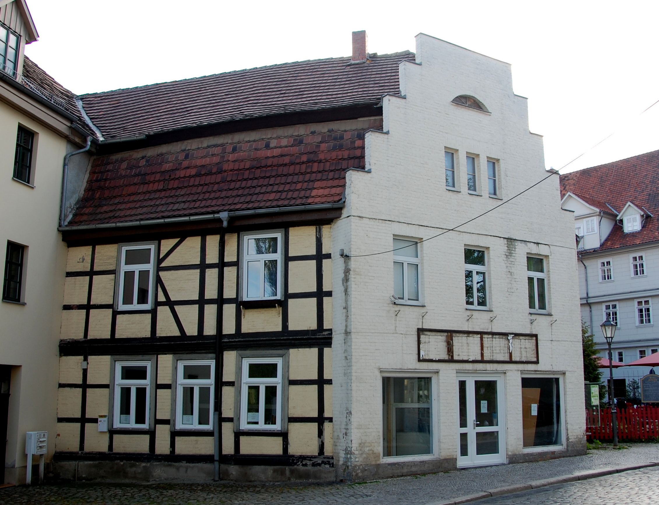 Haus Zwischen den Städten 4 in Quedlinburg